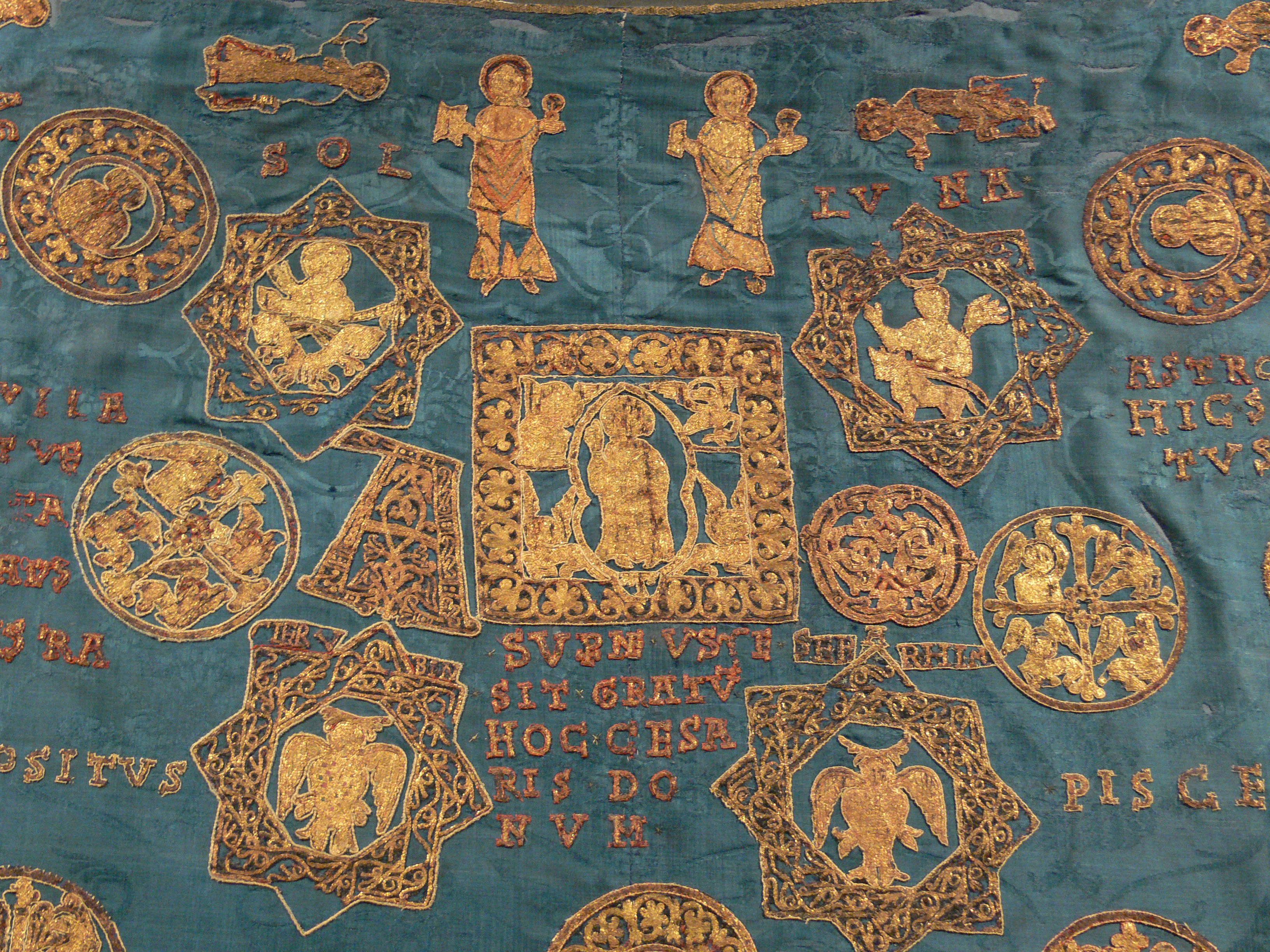 Sternenmantel Kaiser Heinrichs II. Stickereien: Regensburg, um 1018–1024, Trägerstoff: Italien, um 1453. Diözesanmuseum Bamberg (2728/3–6)